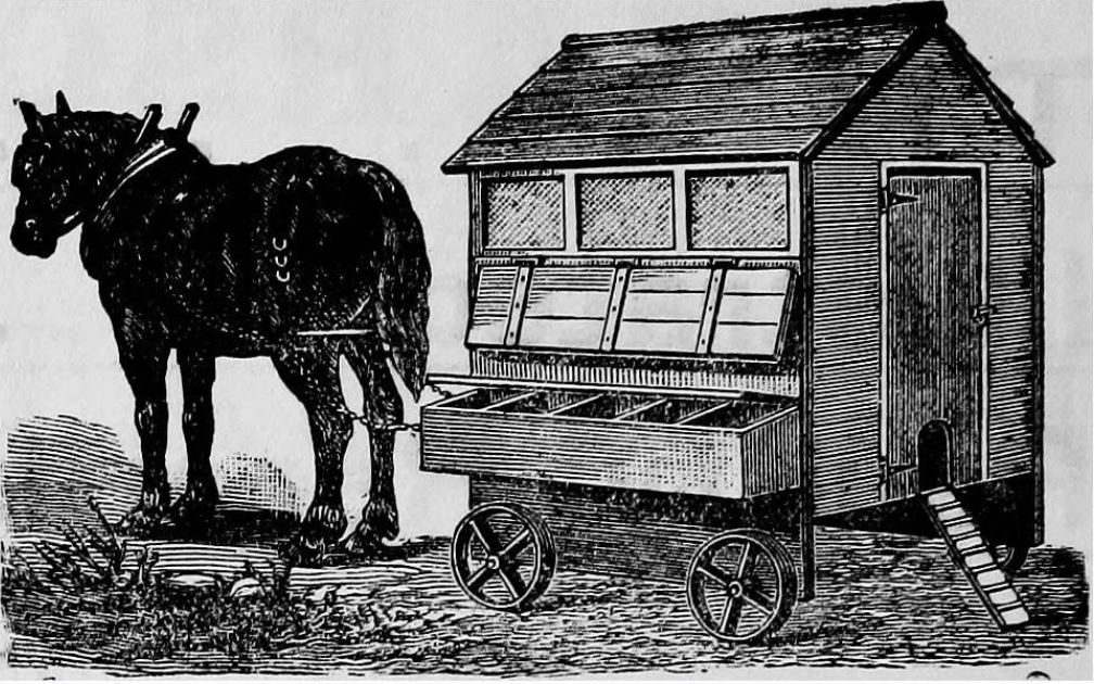 Verplaatsbaar kippenhok (reclame in Report on the poultry industry in Belgium van Edward Brown, 1910)